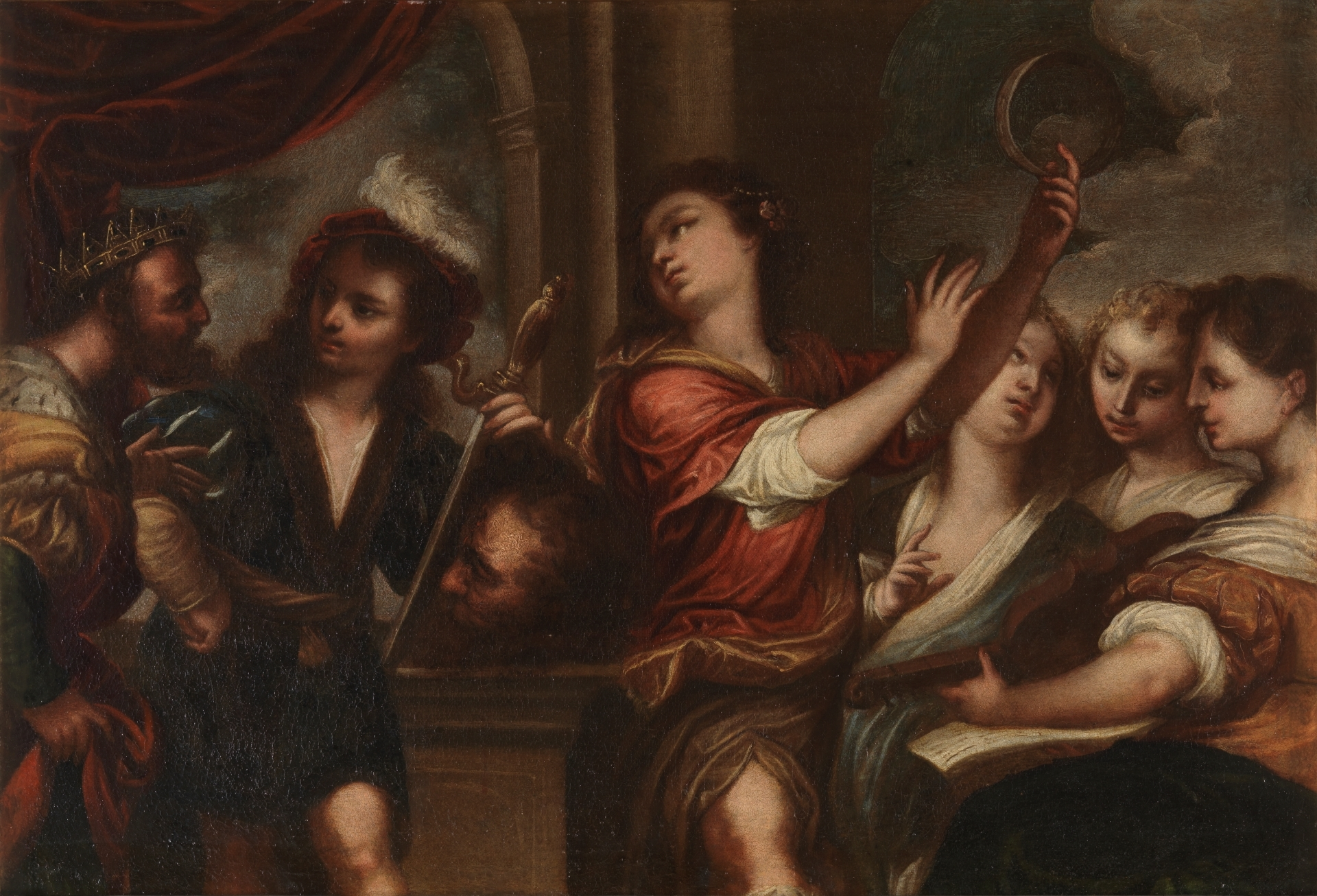 La obra representa a David, el futuro rey de Israel, con la cabeza del gigante filisteo Goliat, a quien había dado muerte.